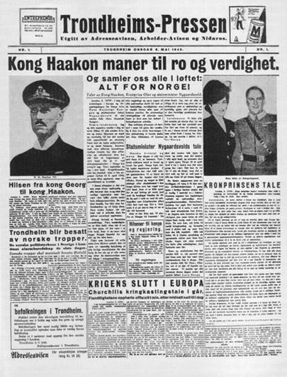 Trondheims-Pressen den 9. mai 1945, en fellesavis mellom av Arbeider-Avisa, Nidaros og Adresseavisen.